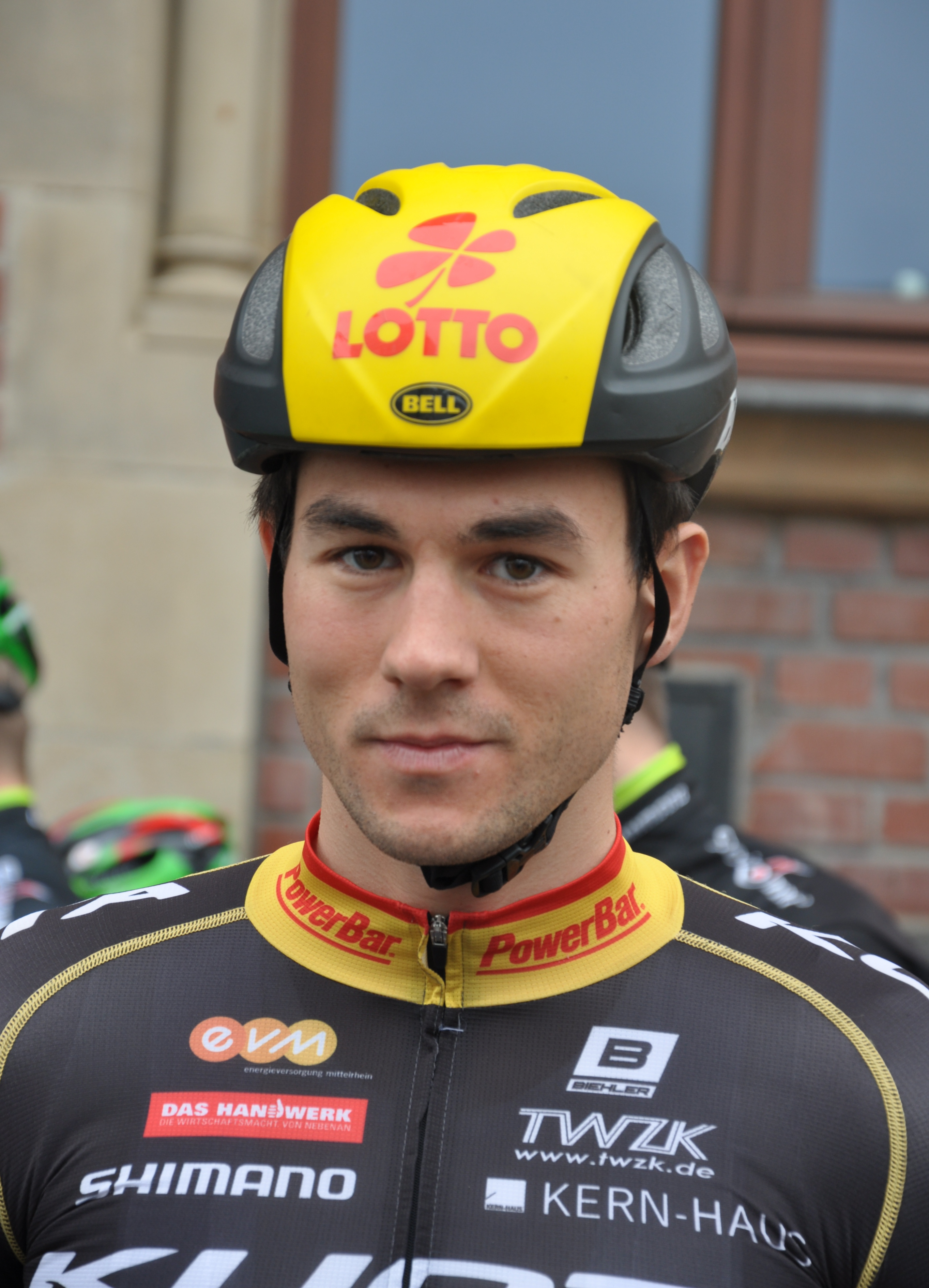 Raphael Freienstein, deutscher Radrennfahrer